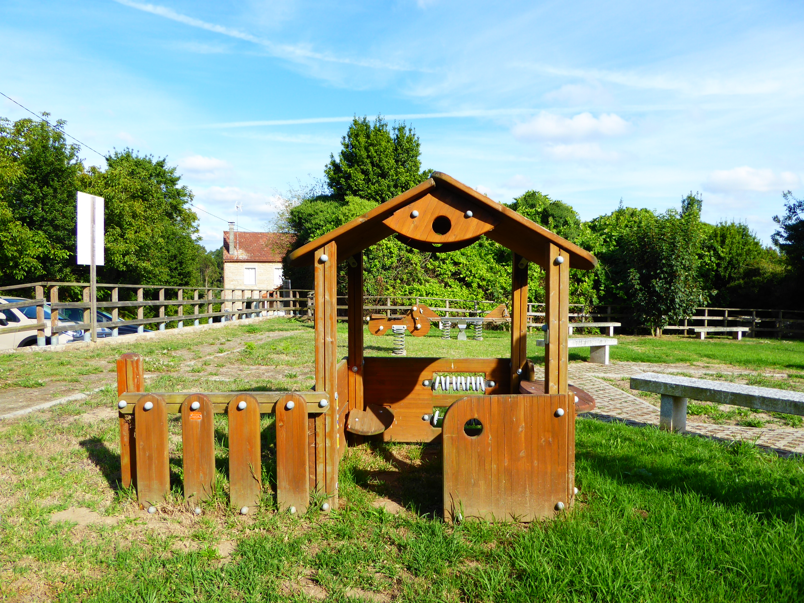 Parque infantil de naturaleza ubicado en Medín (Paderne)